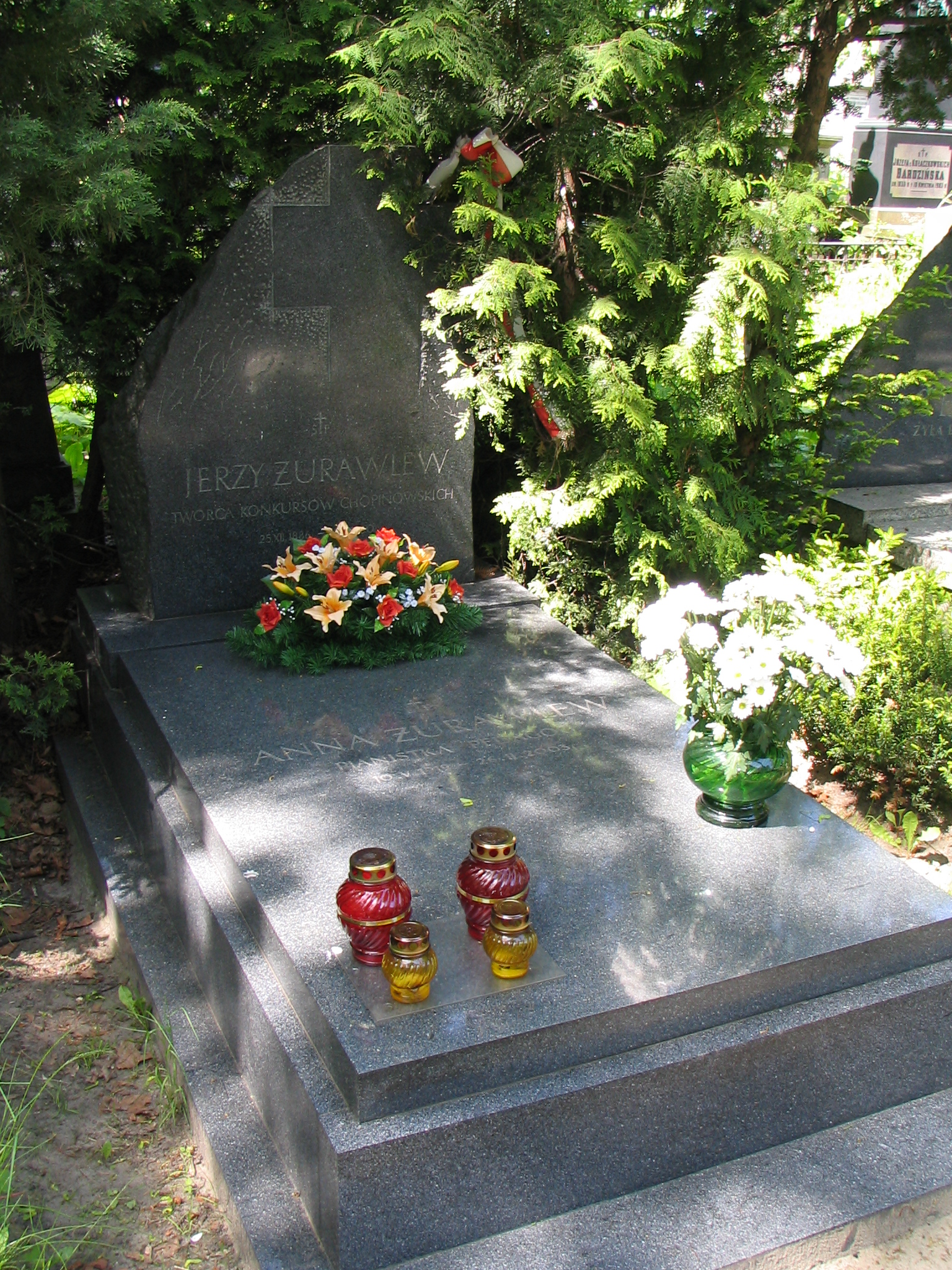 Cmentarz Powązkowski w Warszawie